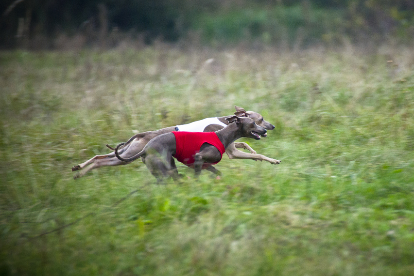 charcik włoski coursing